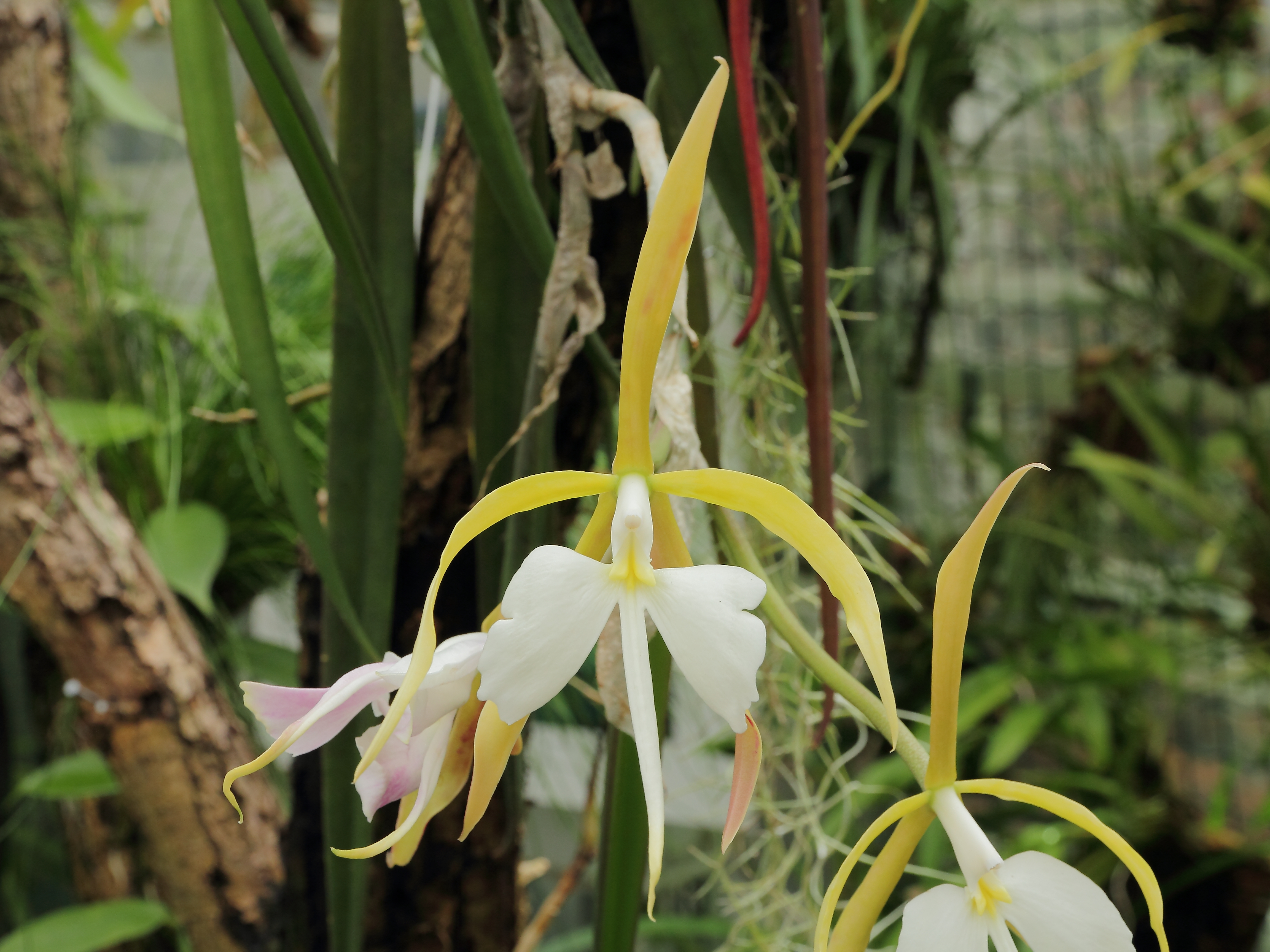 Epidendrum falcatum i Göteborgs Botaniska Trädgård.